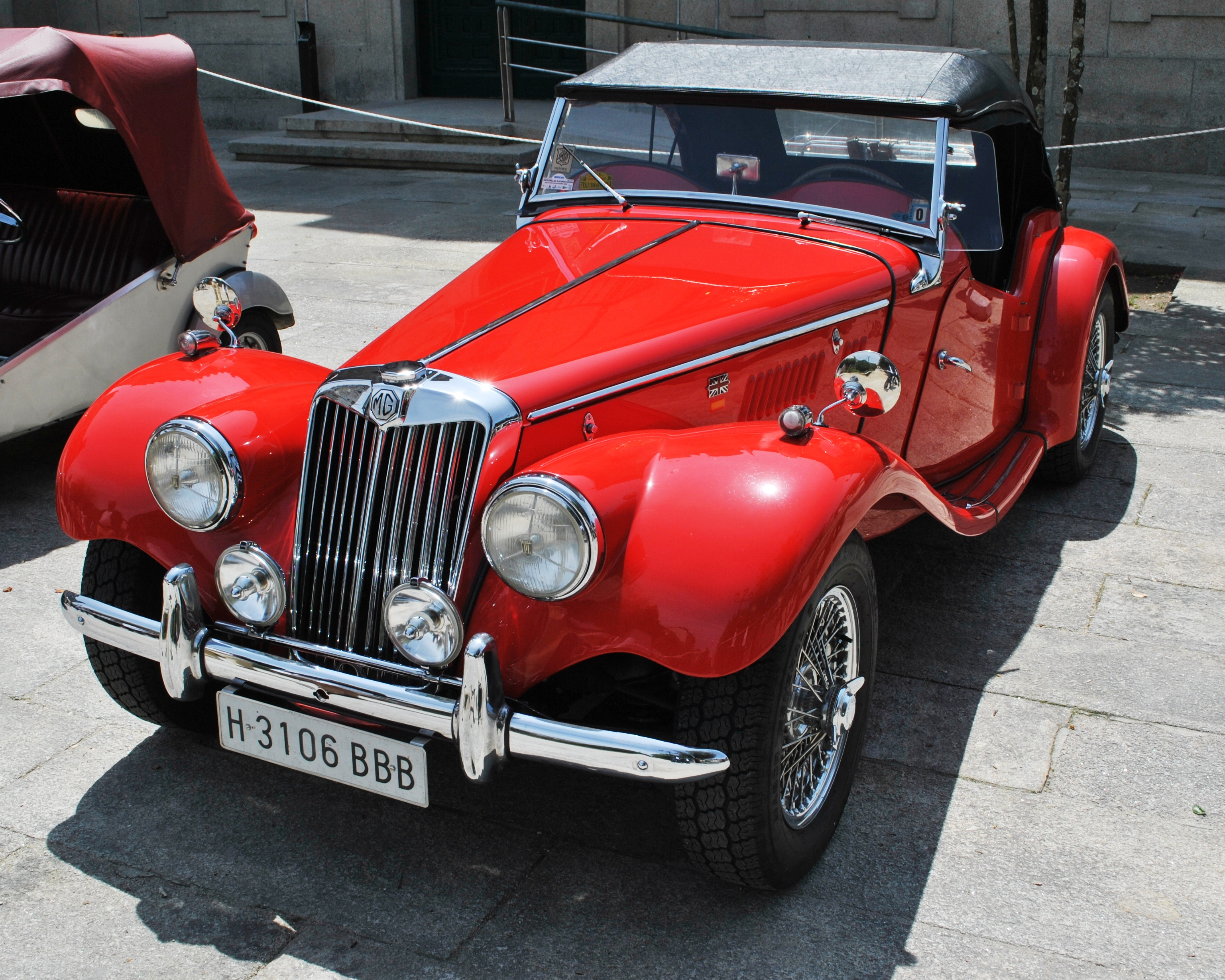 Véxase o título e as categorías.